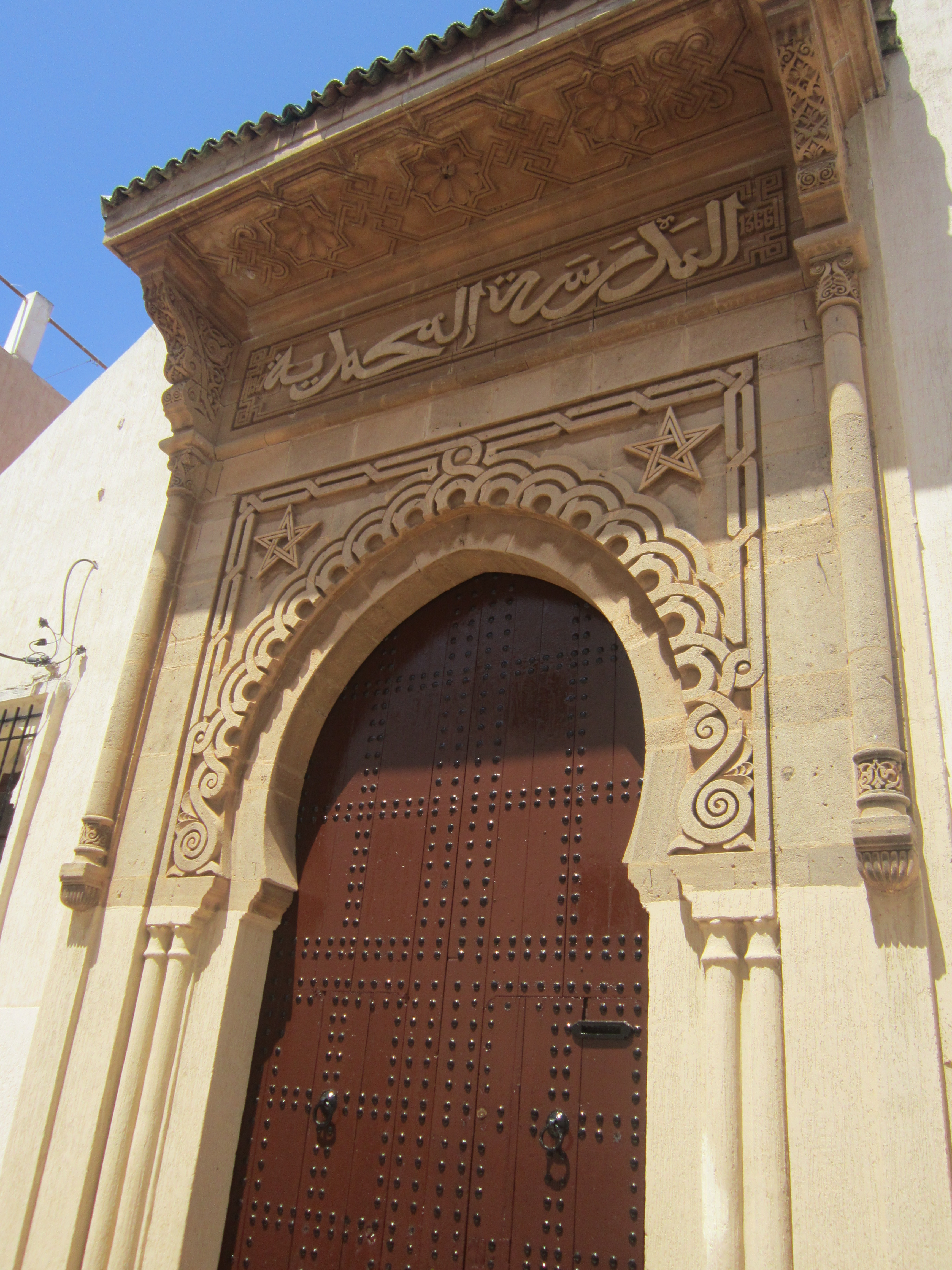 Ecole Mohamedia Salé